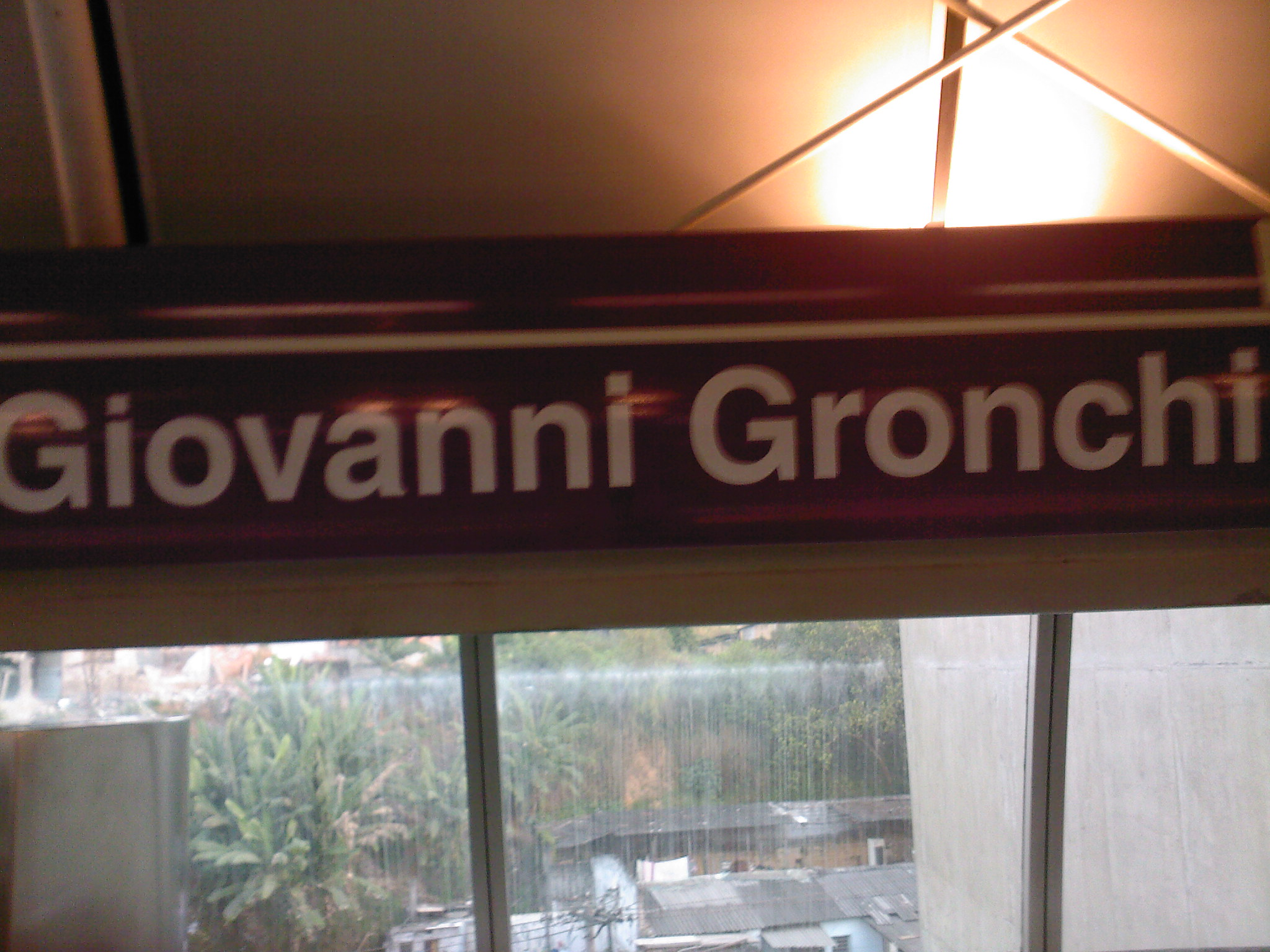 Placa da Estação Giovanni Gronchi, da Linha 5-Lilás